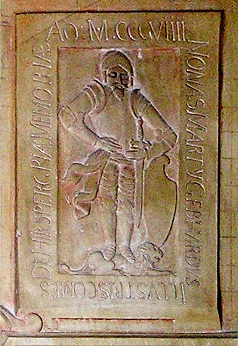 Epitaph_mit_Grabplatte_des_Grafen_Gebhard_VII._von_Hirschberg_in_der_Klosterkirche_von_Rebdorf